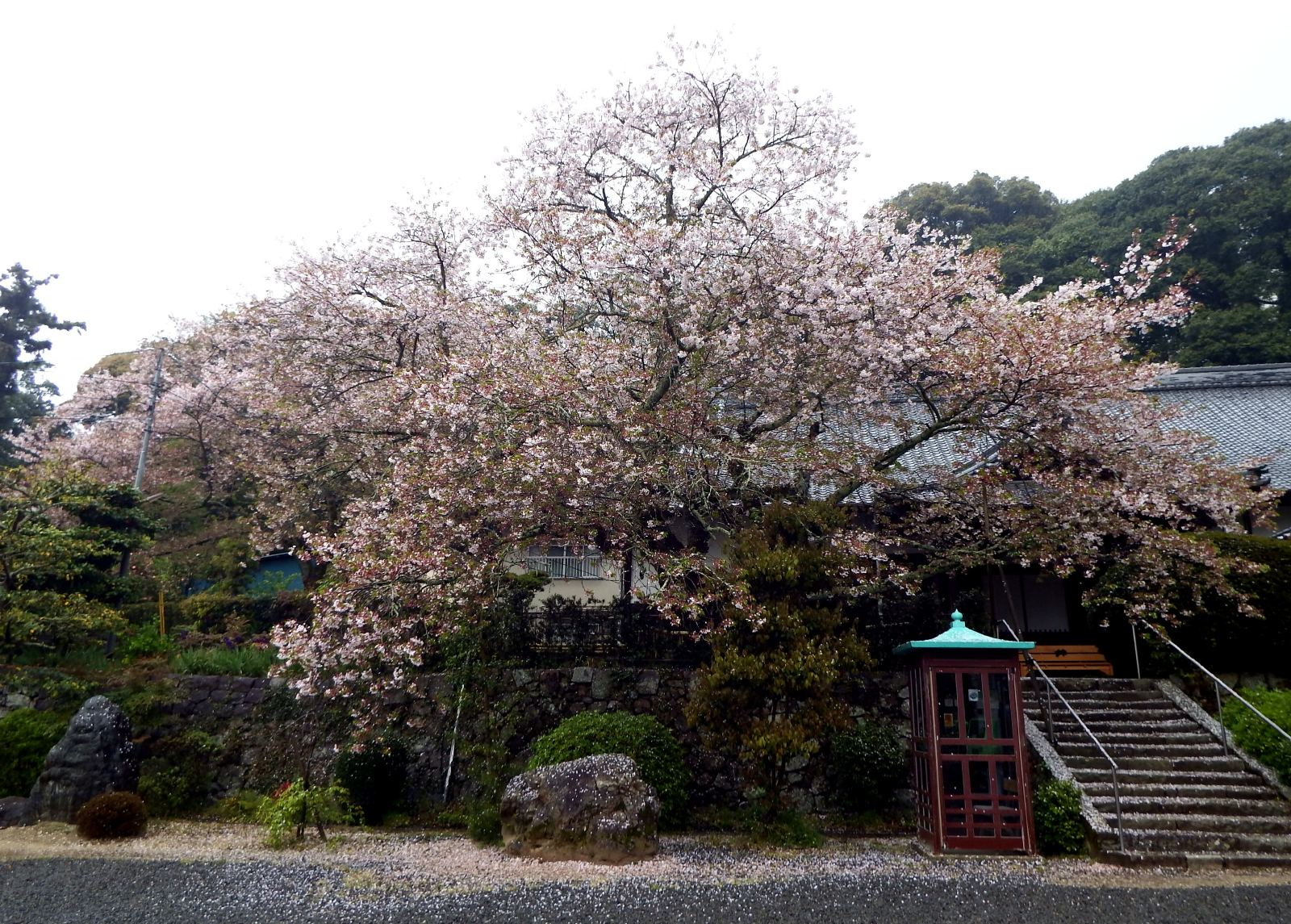 繁多寺の本坊の前に咲くソメイヨシノの古木